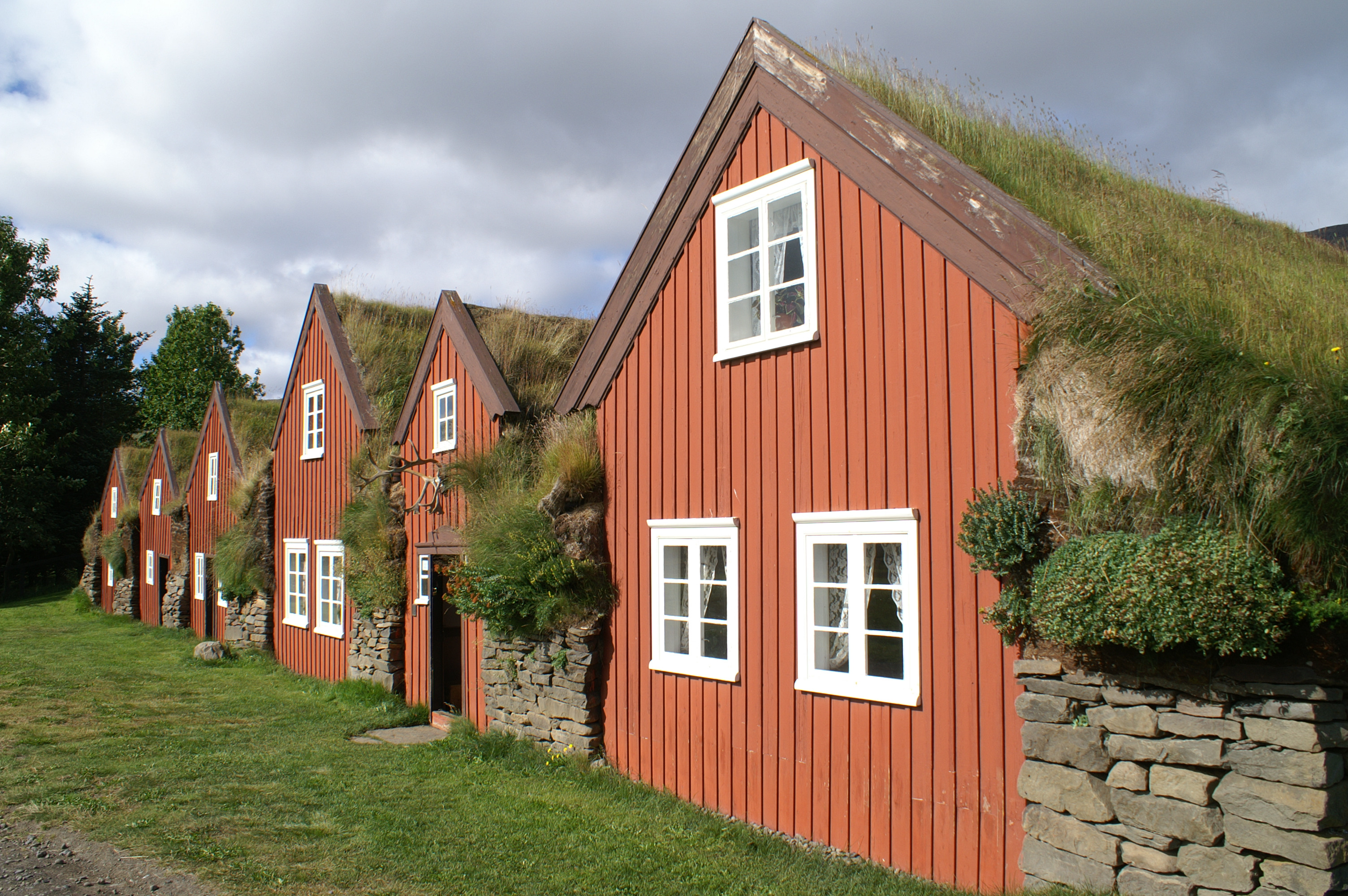 IJsland Bustarfell folk museum